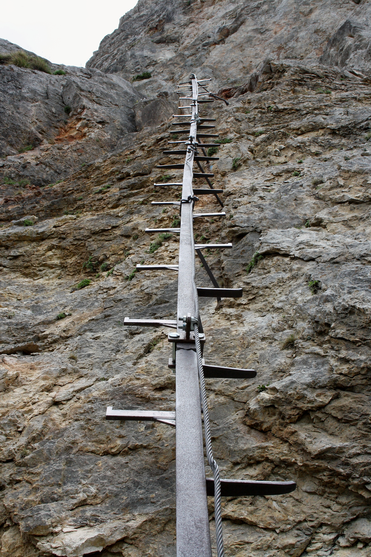 Der untere Steigbaum des Haid-Steiges.